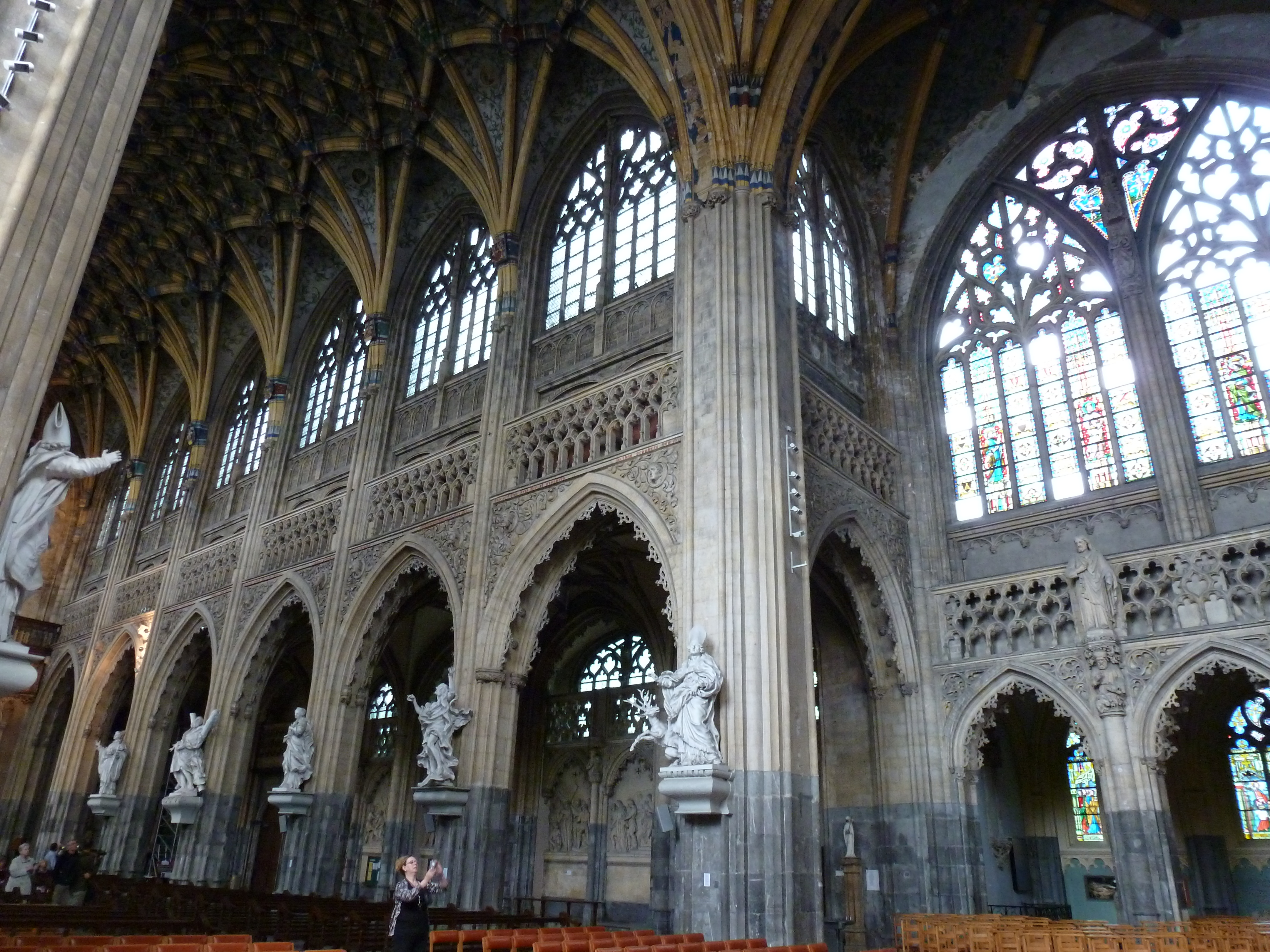 nef centrale